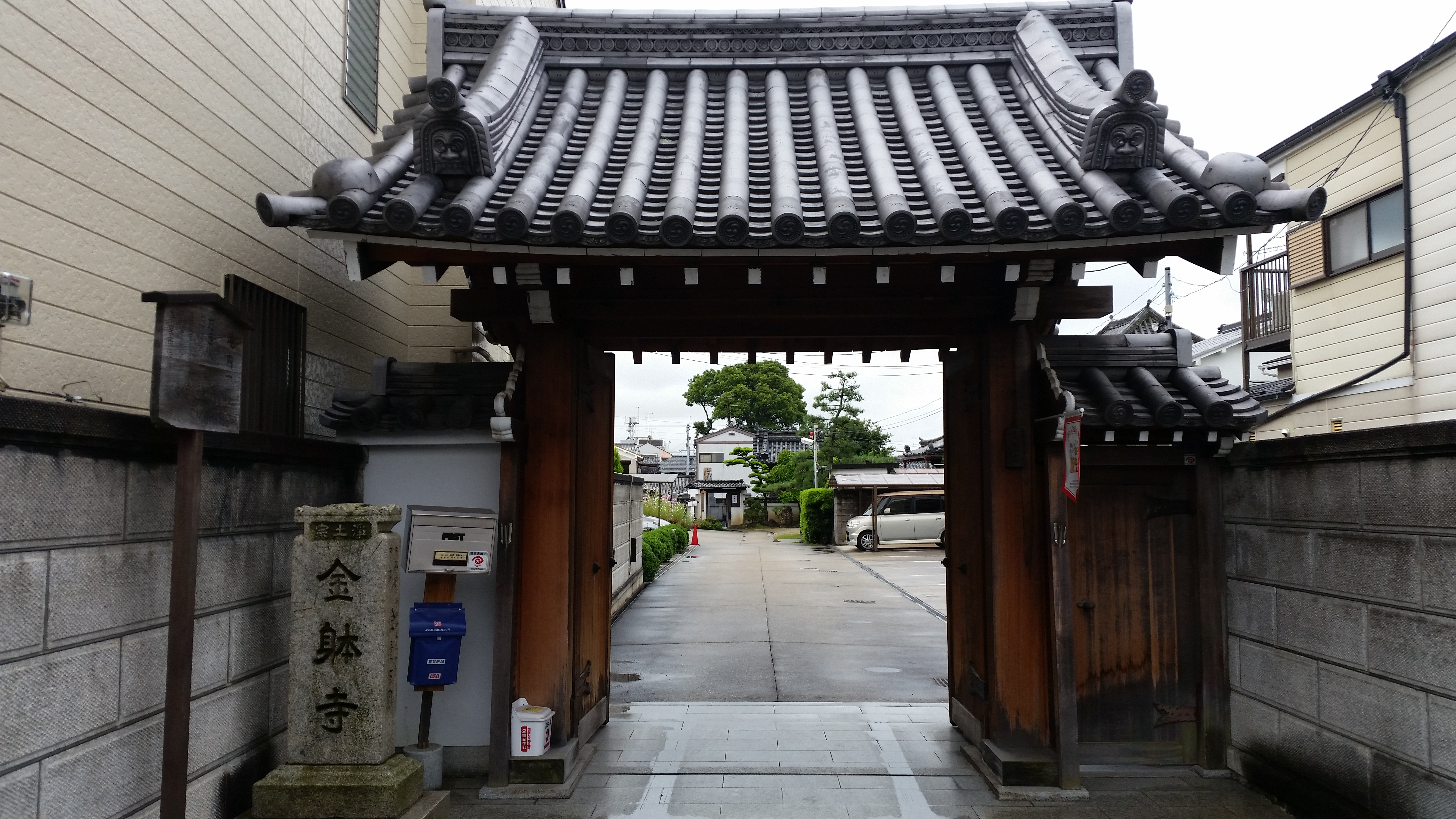 金躰寺北門、奈良